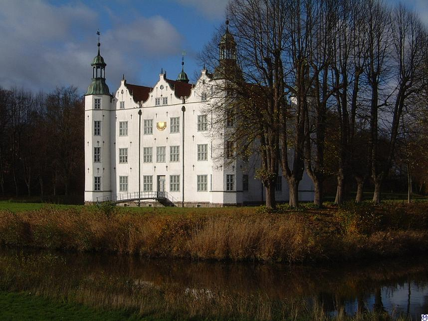 Wasserschloss Ahrensburg bei Hamburg